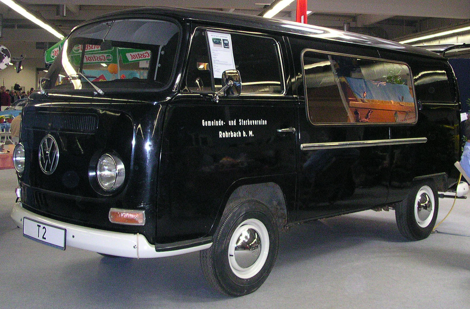 VW Transporter als Leichenwagen, gezeigt in Essen, bei der Technoclassica 2005